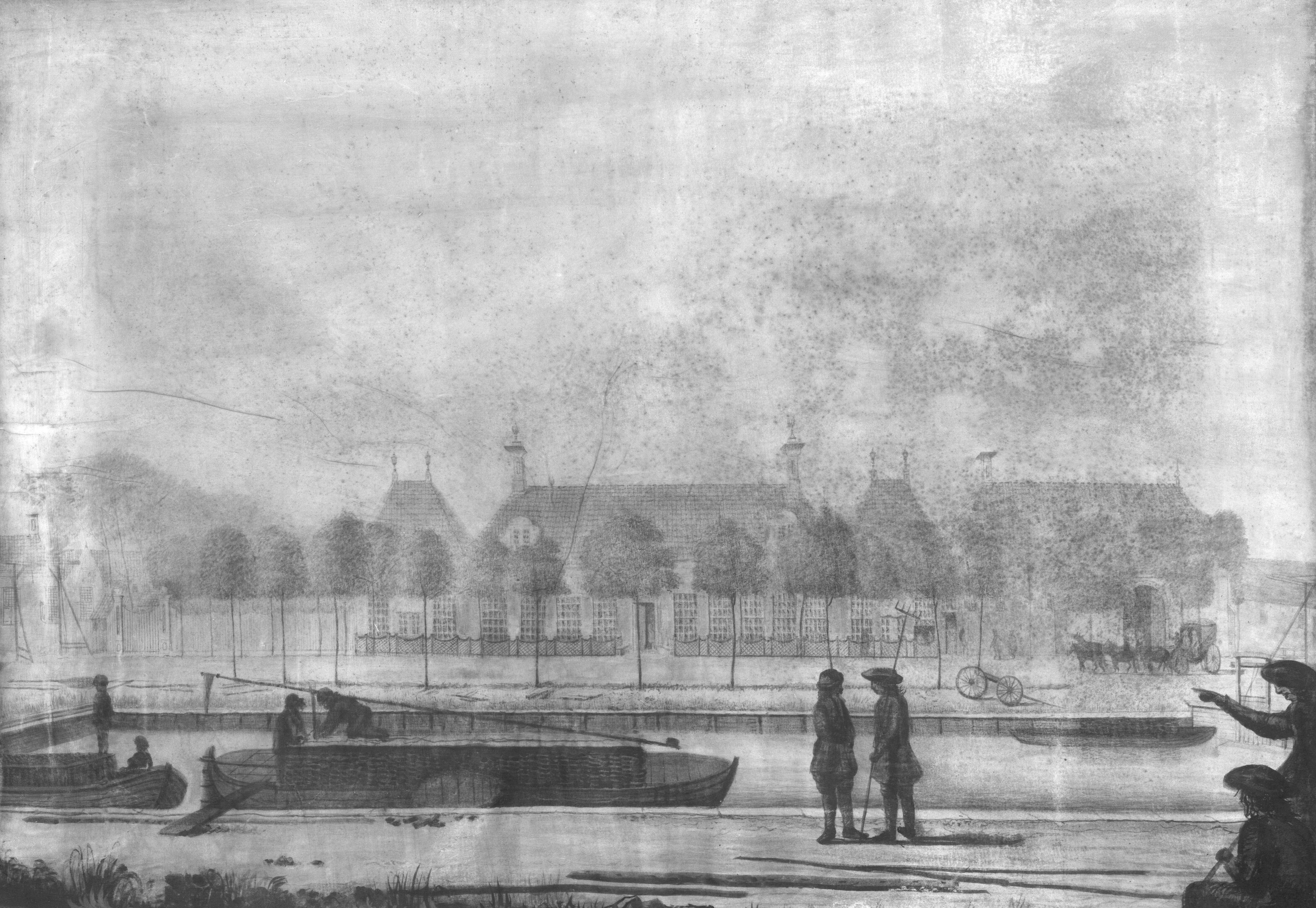 Buitenplaats Woellust te Veendam. Op de voorgrond een kanaal met turfschepen 1745-1765 54 x 71 cm